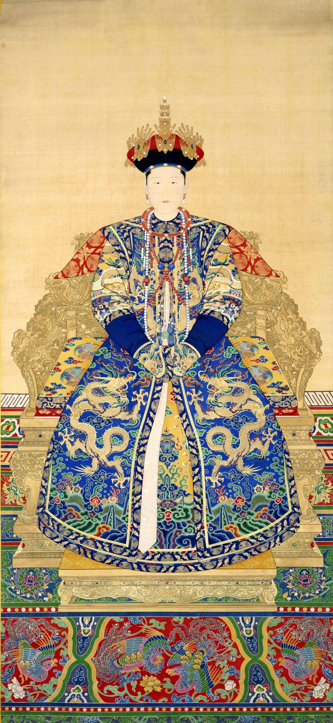 康熙生母肖像